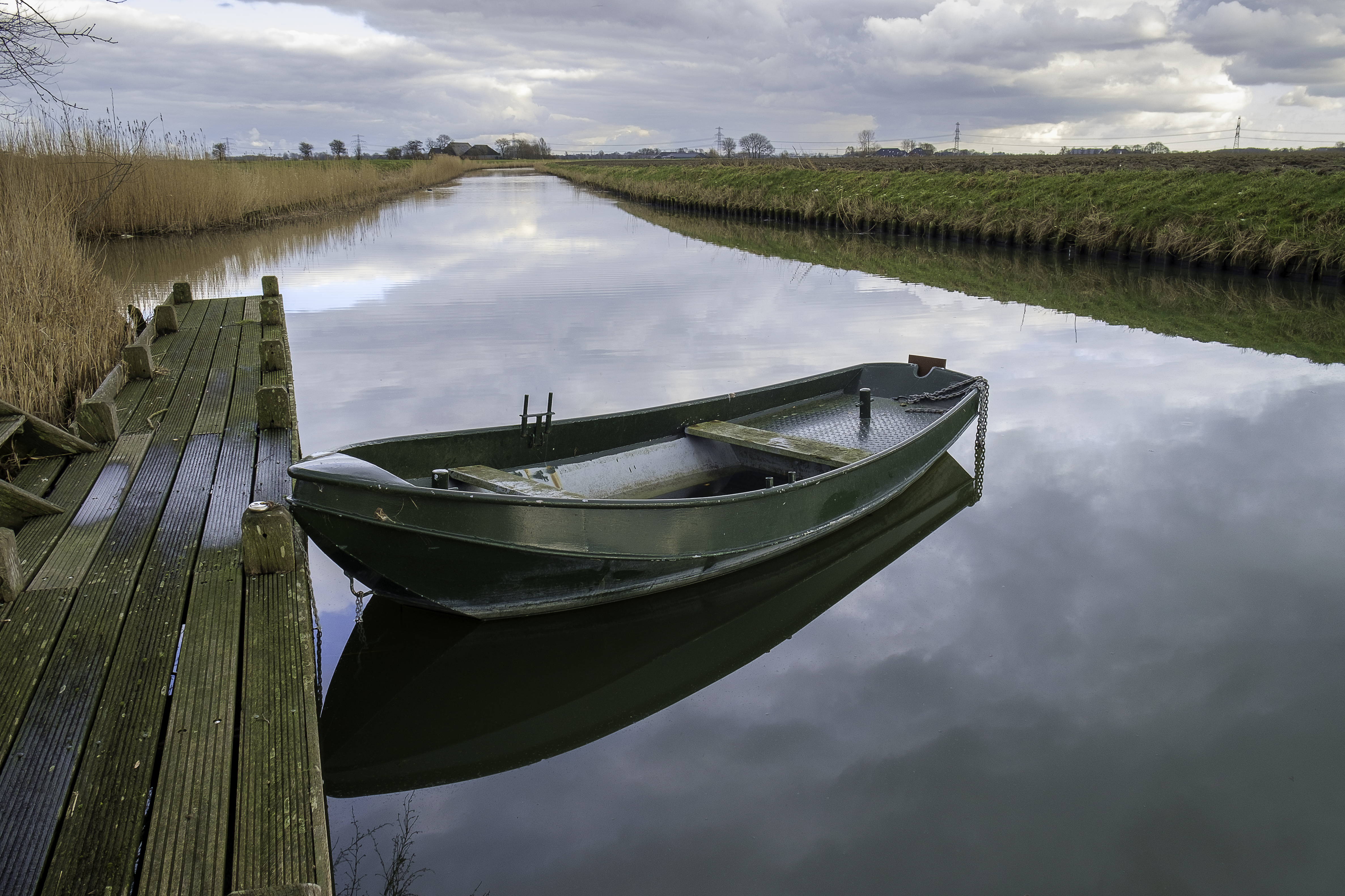 Garsthuizermaar gezien vanaf het haventje